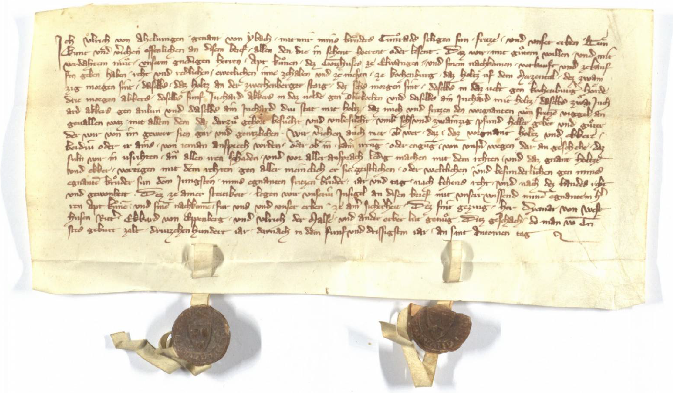 Ellwanger Lagerbuch - Urkunde vom 17. Januar 1335 mit Erstnennung von Oberkochen in der Mitte der sechsten Zeile